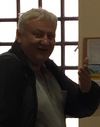 na GEGfestu 2016